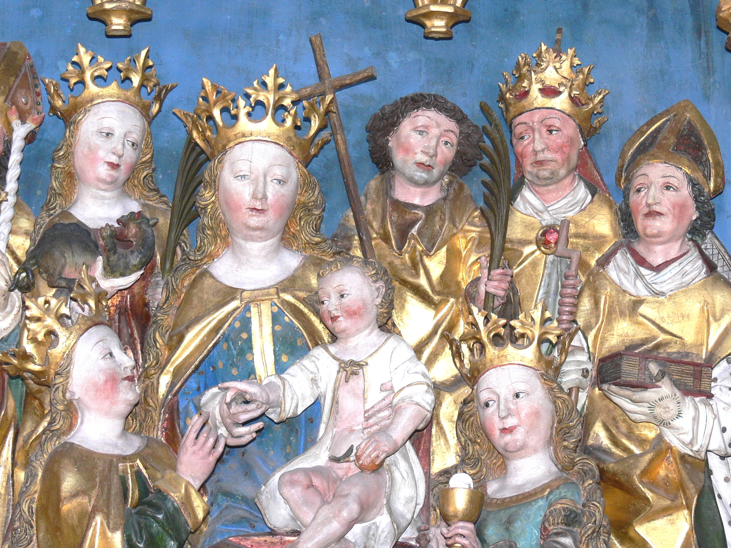 Münster in Heilsbronn. 14-Nothelfer-Altar ( 1498 ): Mystische Vermählung von St.Katharina mit dem Jesuskind auf dem Arm der Jungfrau Maria. Rechts davon knieend St.Barbara. In der 2.Reihe v.l.n.r. St.Margarete, St.Cyriacus, Papst Sixtus, St.Erasmus.